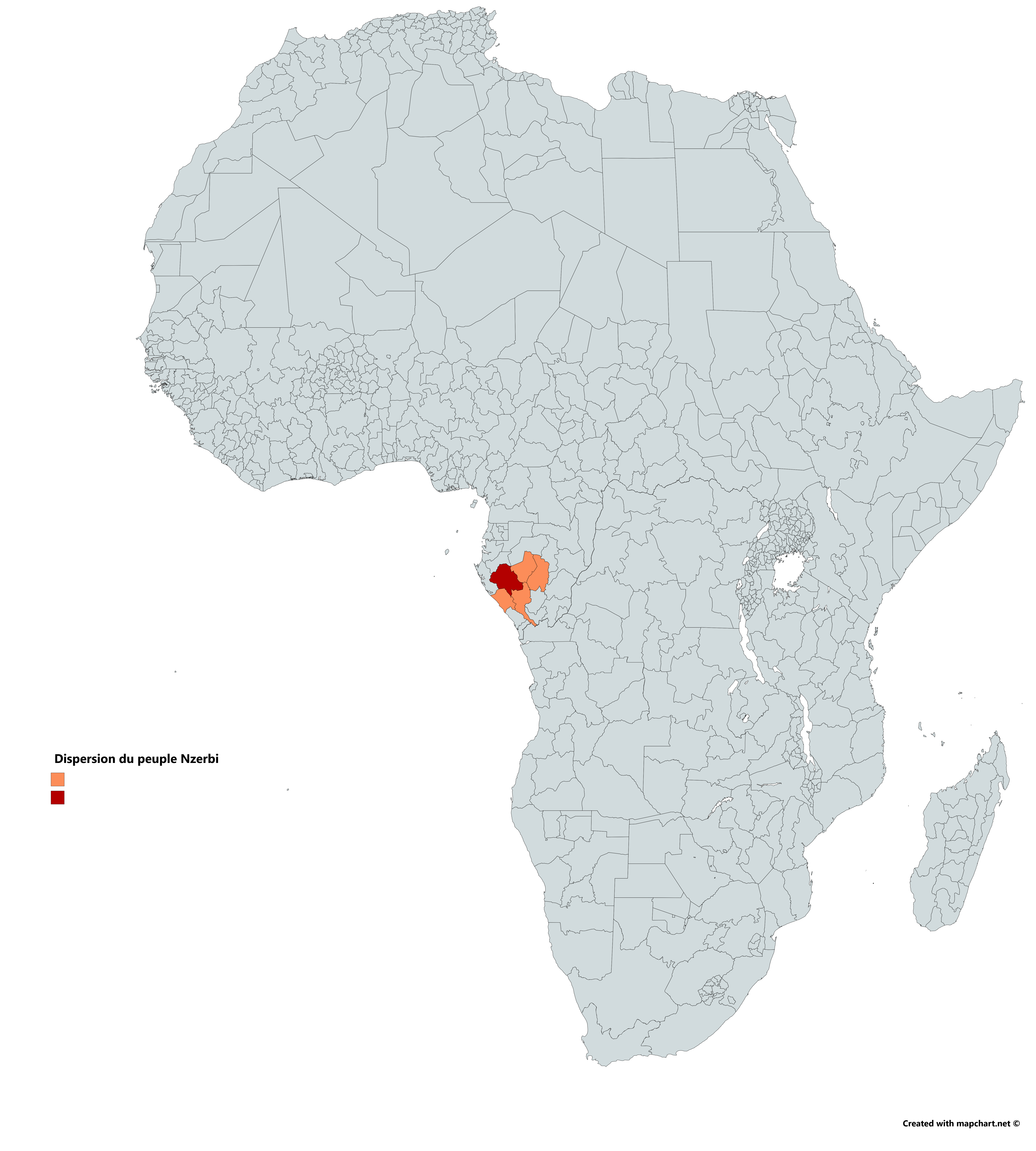 Dispersion du peuple Nzebi